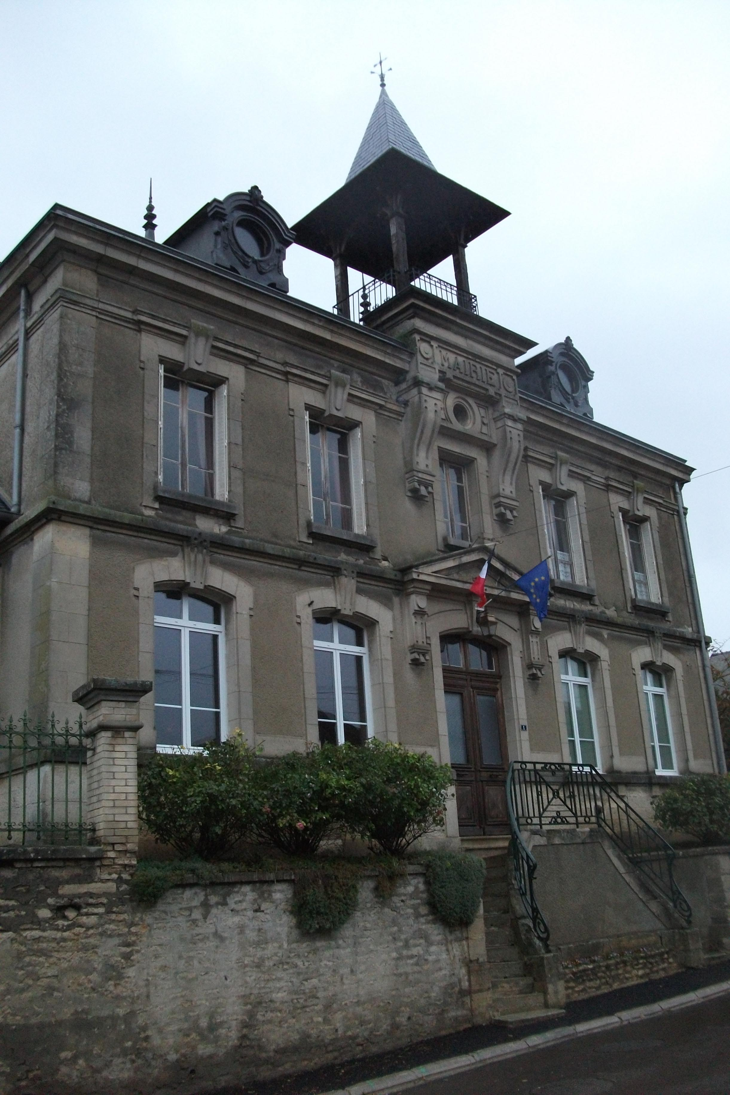 Crugny_la mairie.